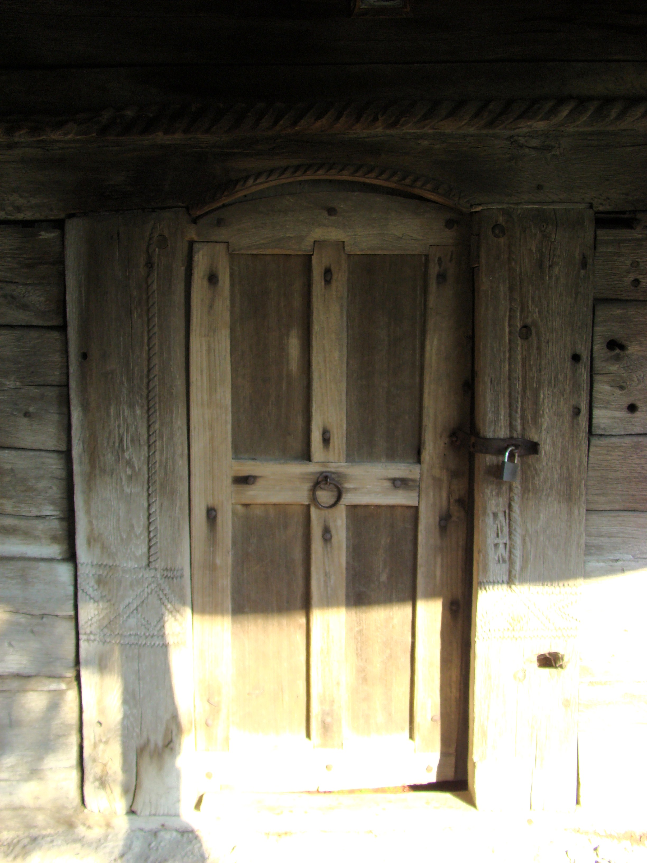 Biserica de lemn „Sf. Andrei” din Pocruia, județul Gorj